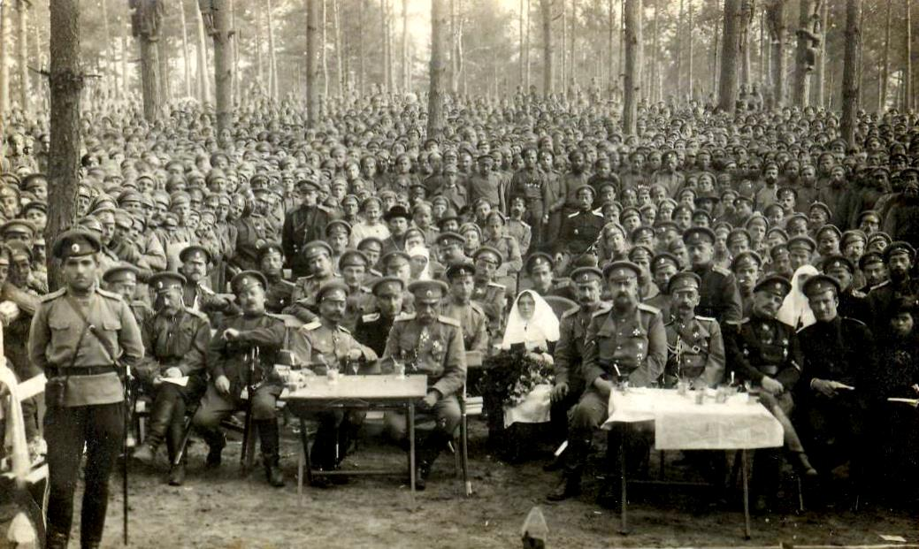 67-я пехотная дивизия (35-й армейский корпус)